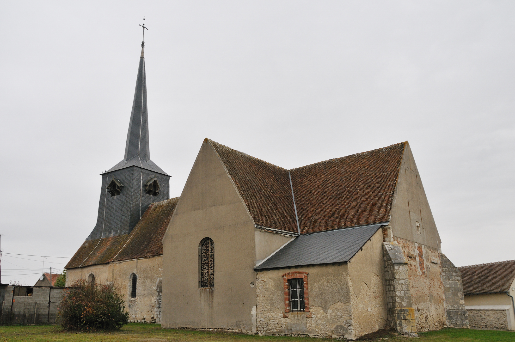 Église Saint-Pierre de Montereau, Loiret, France